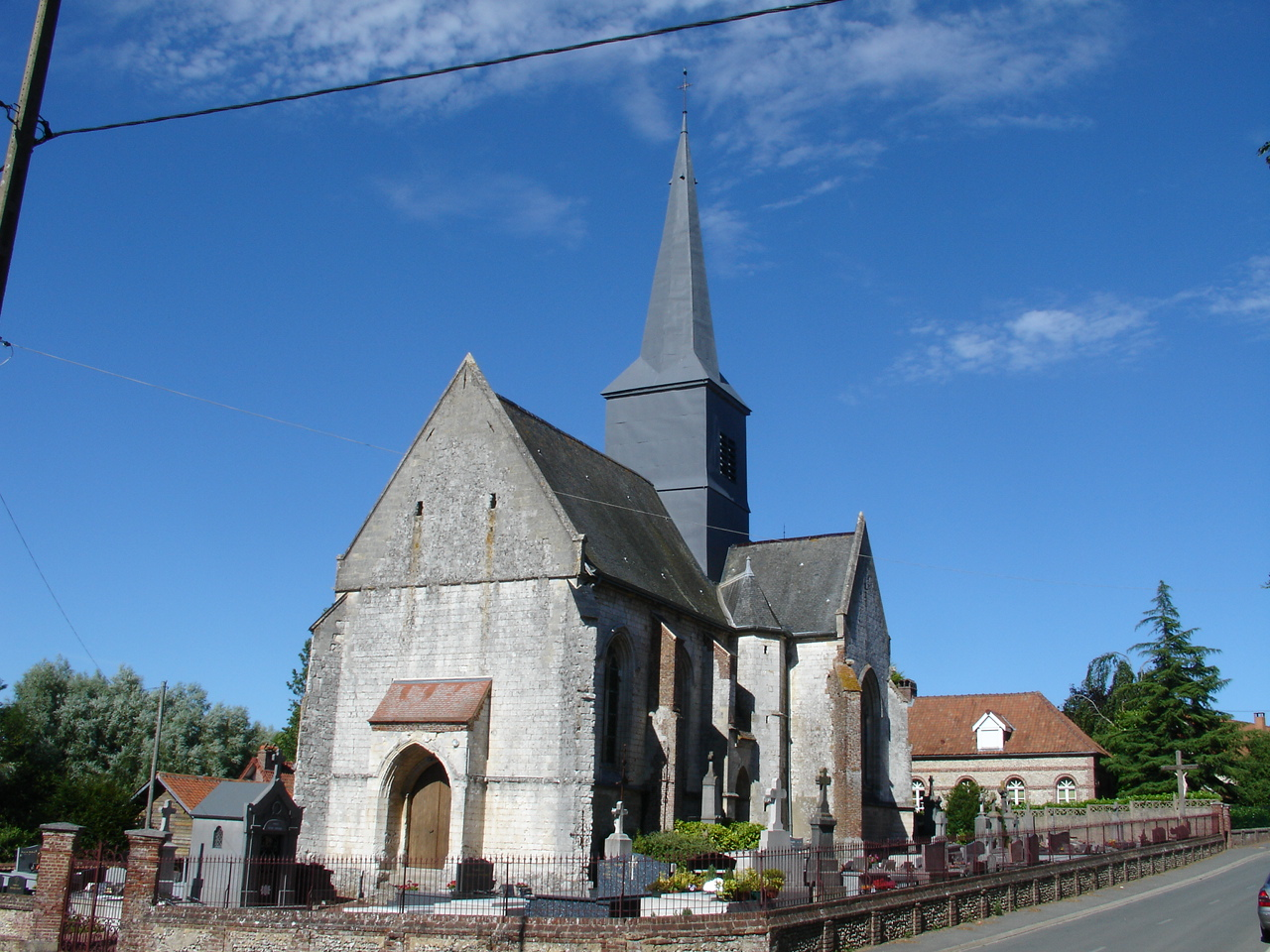 Église de Clenleu .